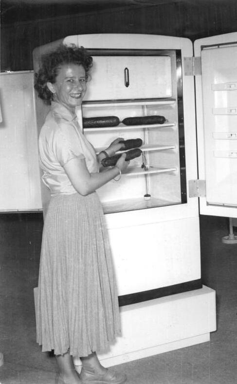 Zentralbild-Klein 1.9.1953 Leipziger Messe 1953 31.August 1953 UBz: Im Handelshof zeigt der VEB Kühlanlagenbau Dresden die Neukonstruktion eines Haushalts-Kühlschrankes für 200 l mit Tiefkühlung